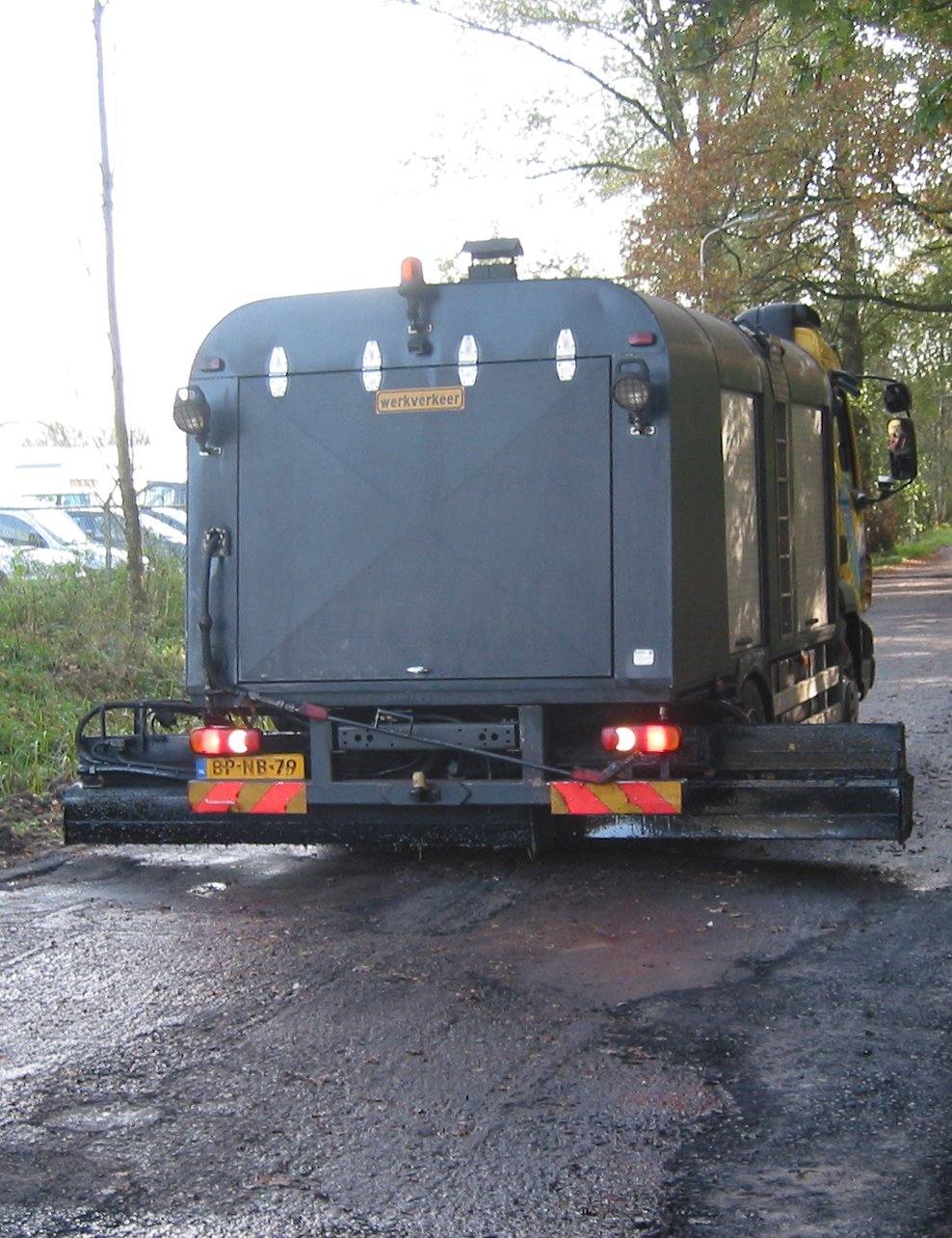 teermachine